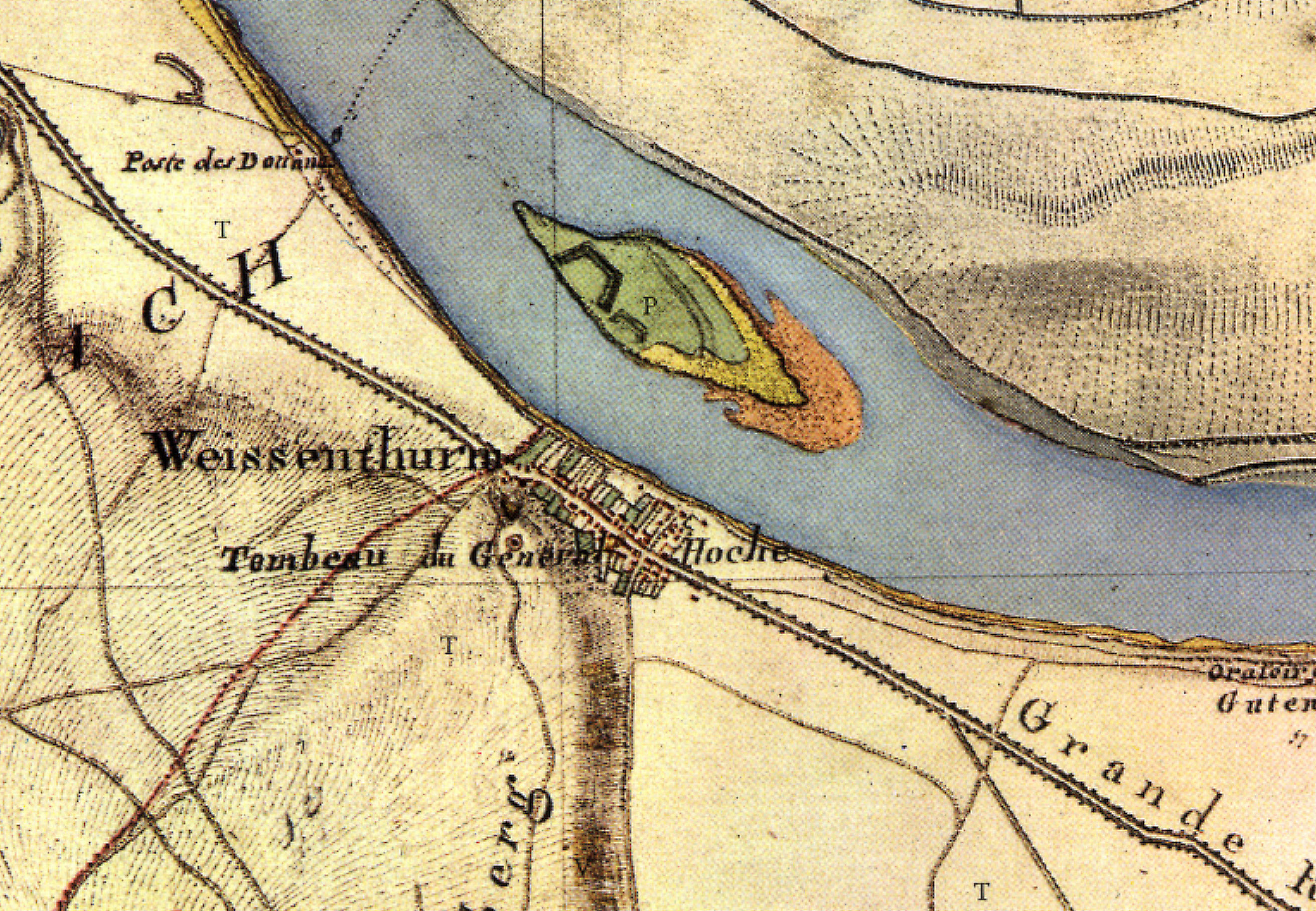 Früheste Kartografie des Monuments Hoche um 1810